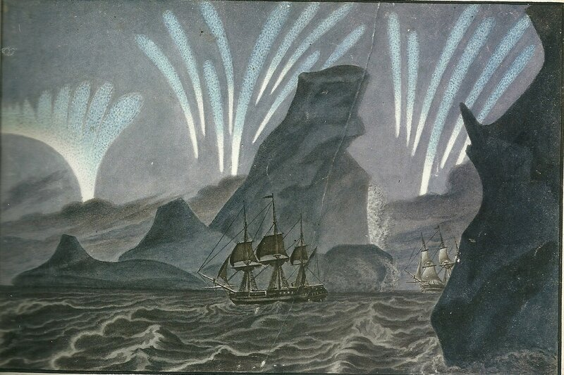 Михайлов Павел Николаевич - Южное сияние